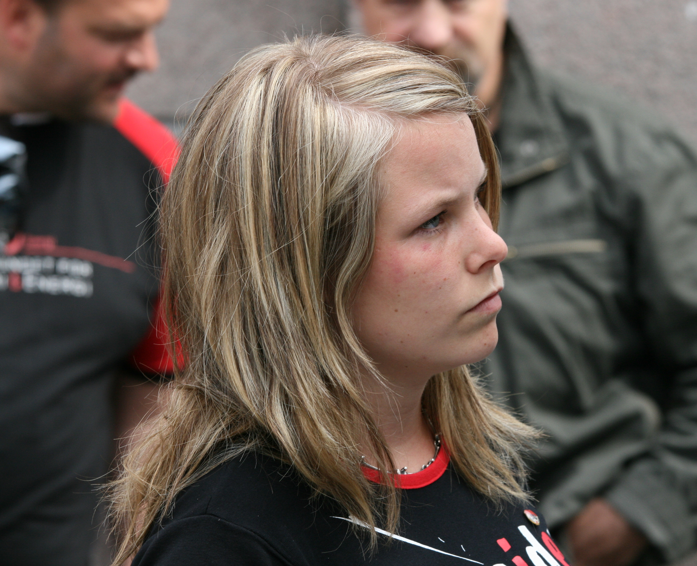 Kirsti Bergstø